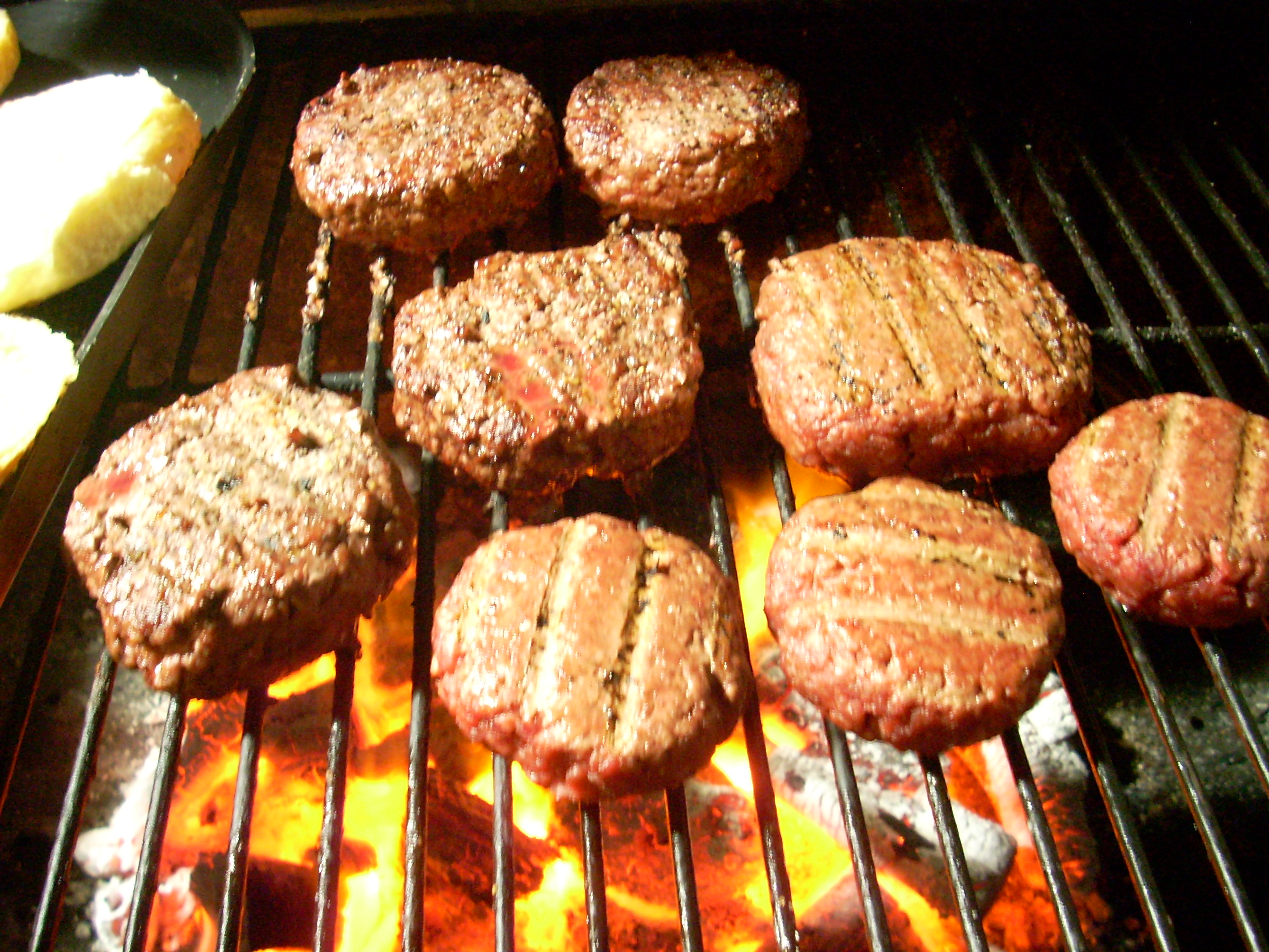 Cocinando carne para hamburguesa al grill.